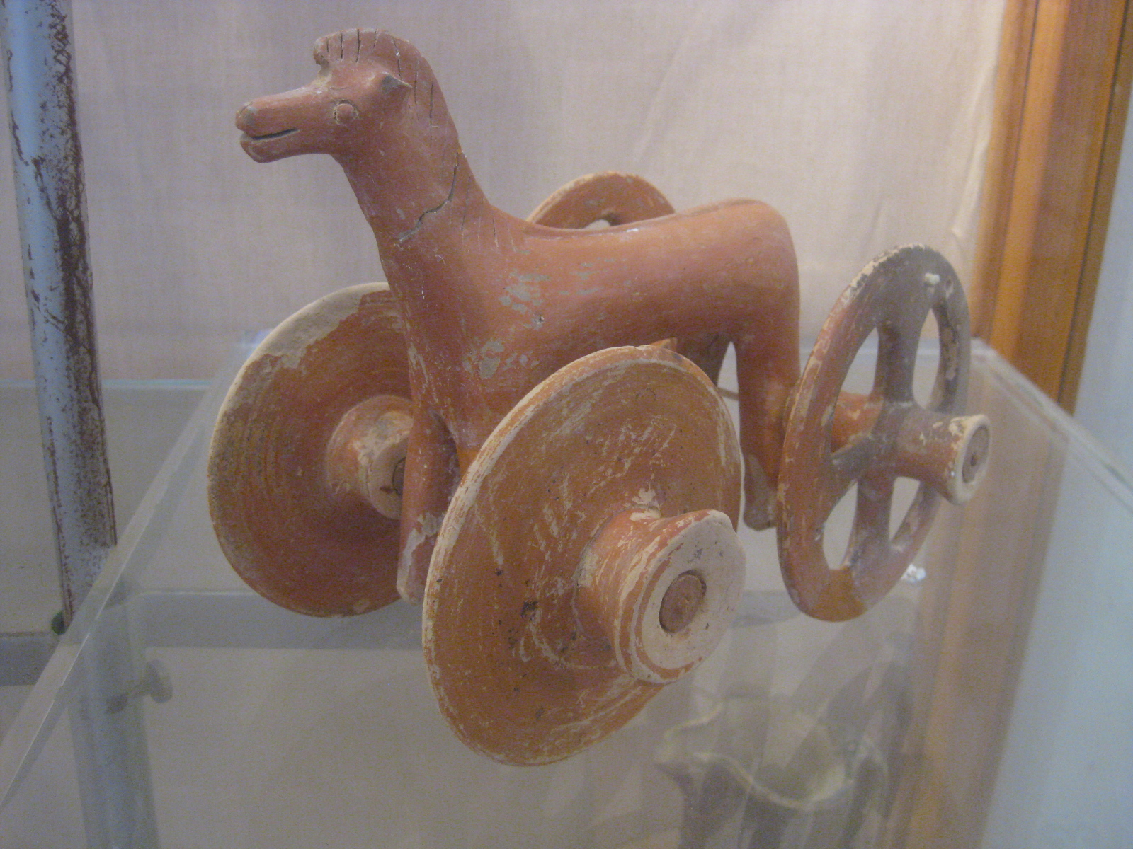 Un élément du musée archéologique de Skyros.